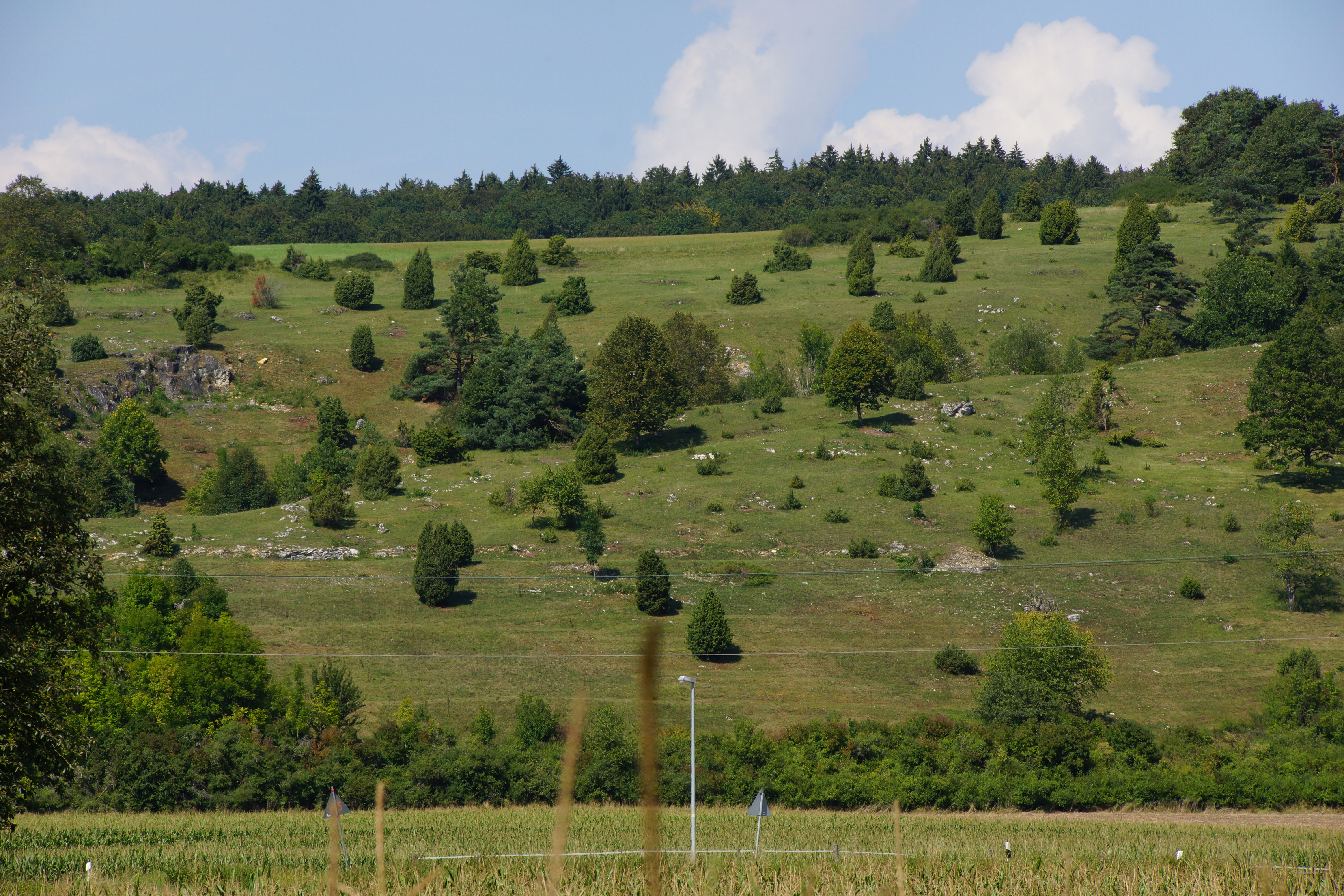 Der Markt Dollnstein im Altmühltal